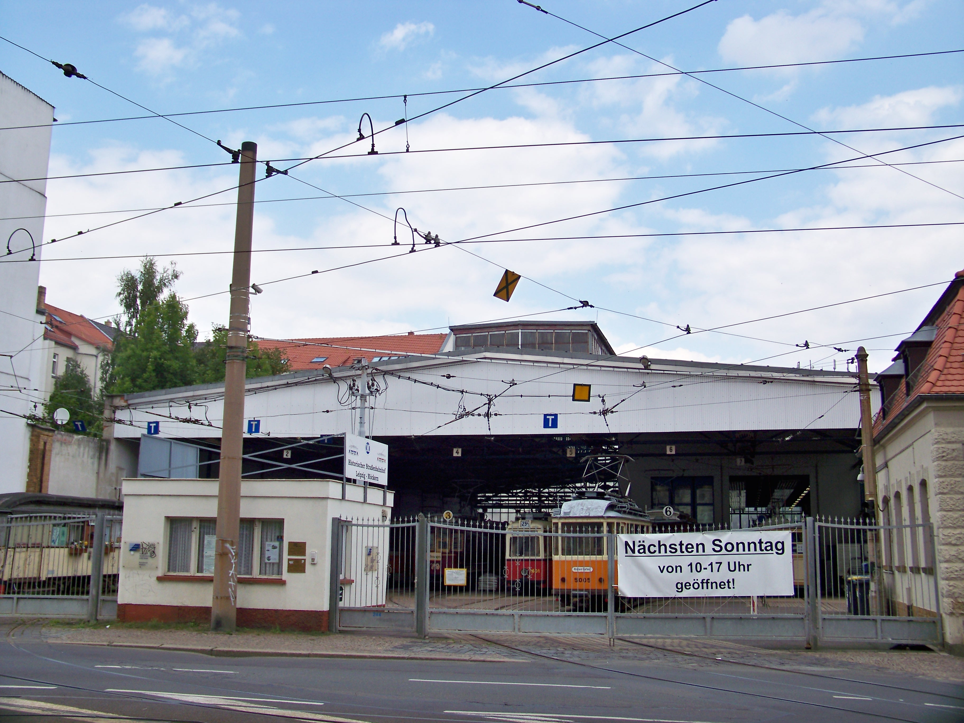 Straßenbahnhof Möckern in Leipzig, heute als Museum Historischer Straßenbahnhof Möckern genutzt